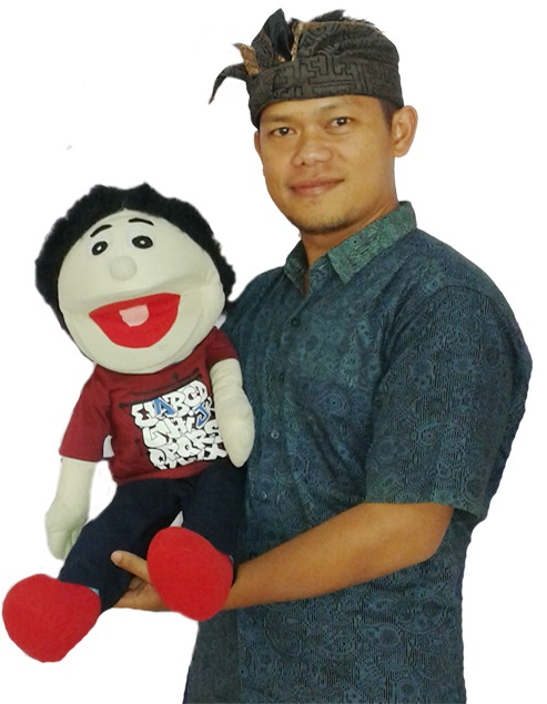 Kak Ansori Oke seorang Storyteller asal Bogor yang memberikan kecerian dan kebahagiaan untuk anak-anak Indonesia